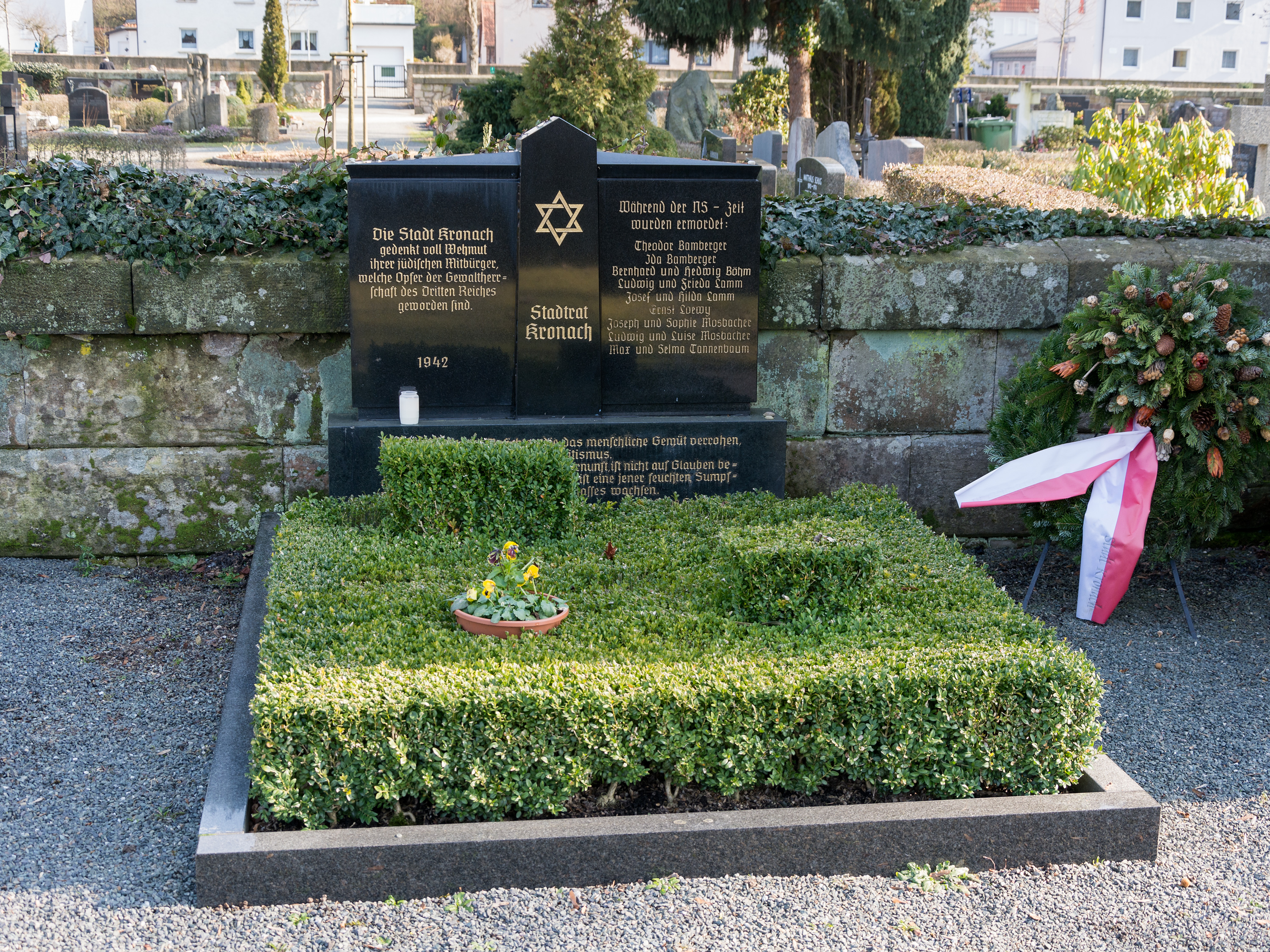 Gedenkstein für die jüdischen Opfer des Nationalsozialismus auf dem Friedhof der oberfränkischen Stadt Kronach. Die Inschrift am Sockel lautet: “Von allen bigotten Ansichten, die das menschliche Gemüt verrohen, ist keine so töricht wie der Antisemitismus. Er hat keine Berechtigung in der Vernunft, ist nicht auf Glauben be- gründet, sucht kein Ideal, sondern er ist eine jener feuchten Sumpf- pflanzen, die im Morast des Rassenhasses wachsen.” —Lloyd George, 1923 Der Gedenkstein wurde Ende 2015 überarbeitet, da Nachforschungen zum Schicksal der Kronacher Juden ergeben hatten, dass die Daten auf dem Stein nur teilweise den Tatsachen entsprachen: Einige der in der Namensliste Genannten hatten die Judenverfolgungen der Nationalsozialisten im Exil überlebt, während die Namen mehrerer ermordeter Kronacher Juden fehlten. Weiterhin wurde die Bepflanzung der Gedenkstätte verändert, da das Zitat von Lloyd George am Sockel des Gedenksteins zuvor von dem Bewuchs verdeckt war.